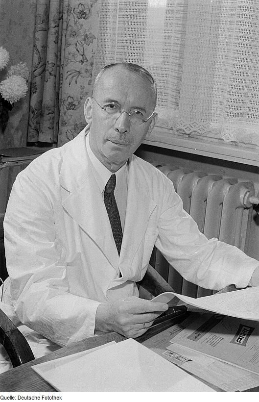 Original image description from the Deutsche Fotothek Portrait Albrecht Peipers anlässlich seiner Auszeichnung mit dem Nationalpreis 3. Klasse